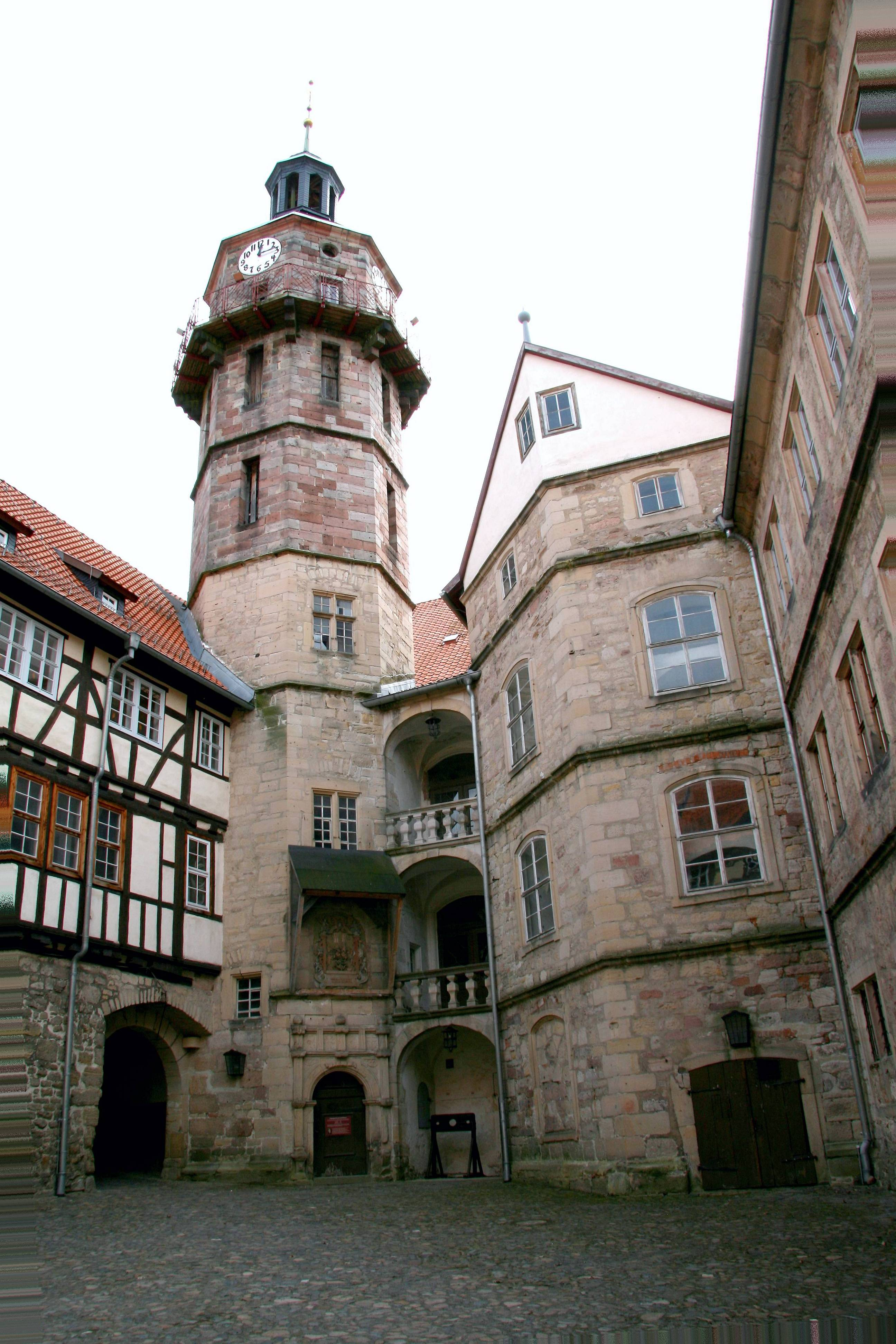 Schloss Bertholdsburg in Schleusingen. Aussichtsturm (Hauptturm) an der SÃ¼dostecke des Innenhofes. Daten: HÃ¶he des Turmes 38 m, 128 Stufen, 1597 Neuaufbau, Turmuhr seit 1561 (1934 renoviert).